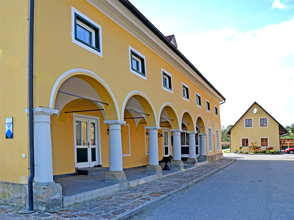 Pistorf Affahrtmühle Maierhof ObjektID: 45455